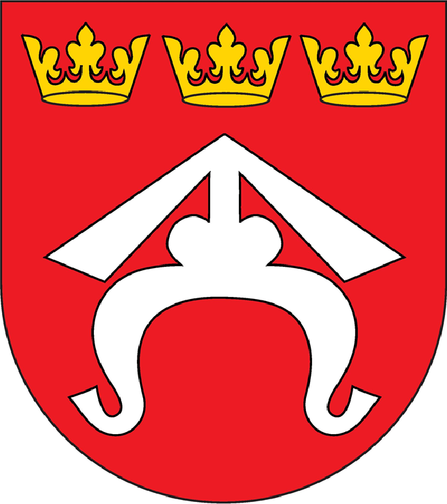 Herb gminy Dębno w województwie małopolskim.